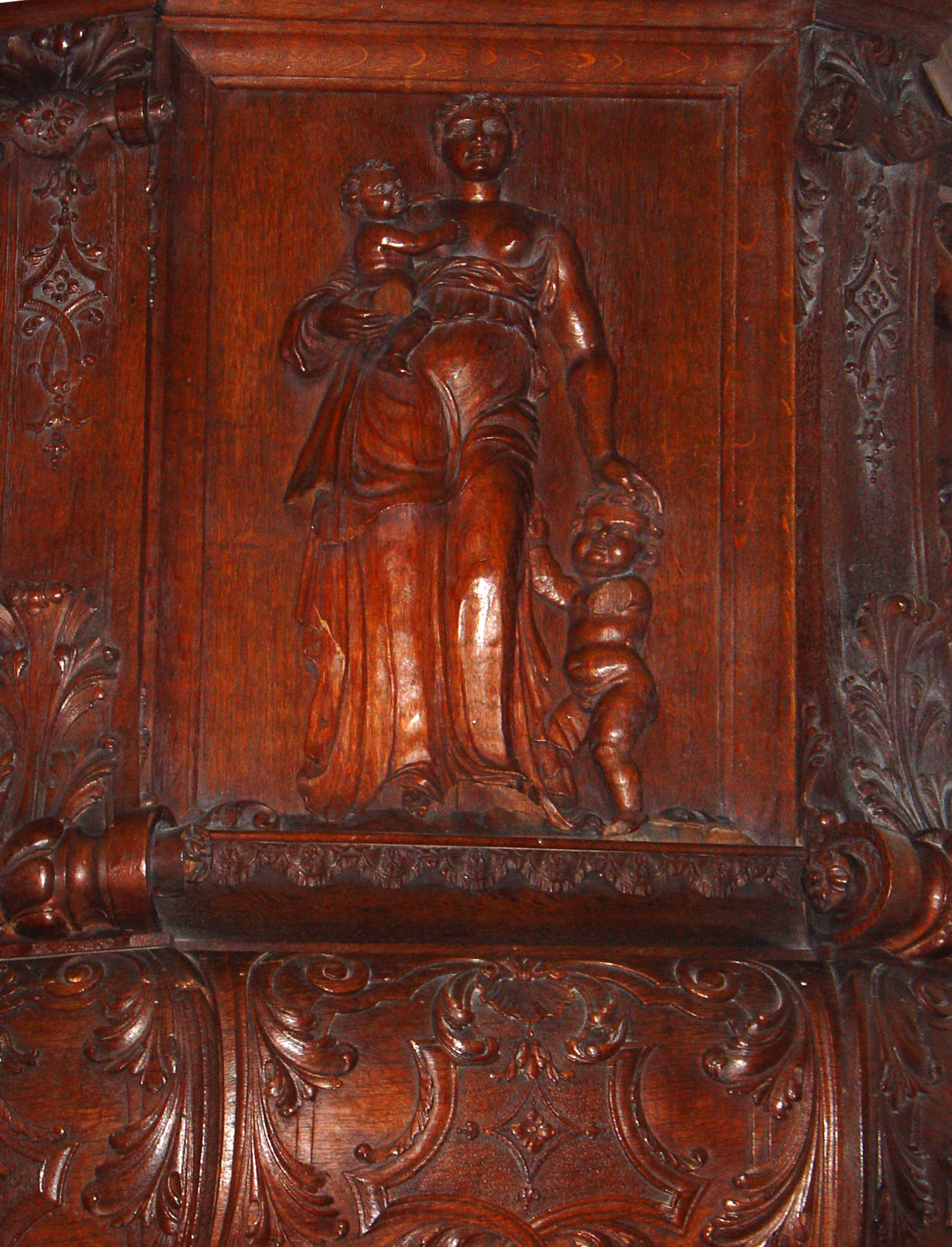 Preekstoel van de Petruskerk van Zuidbroek